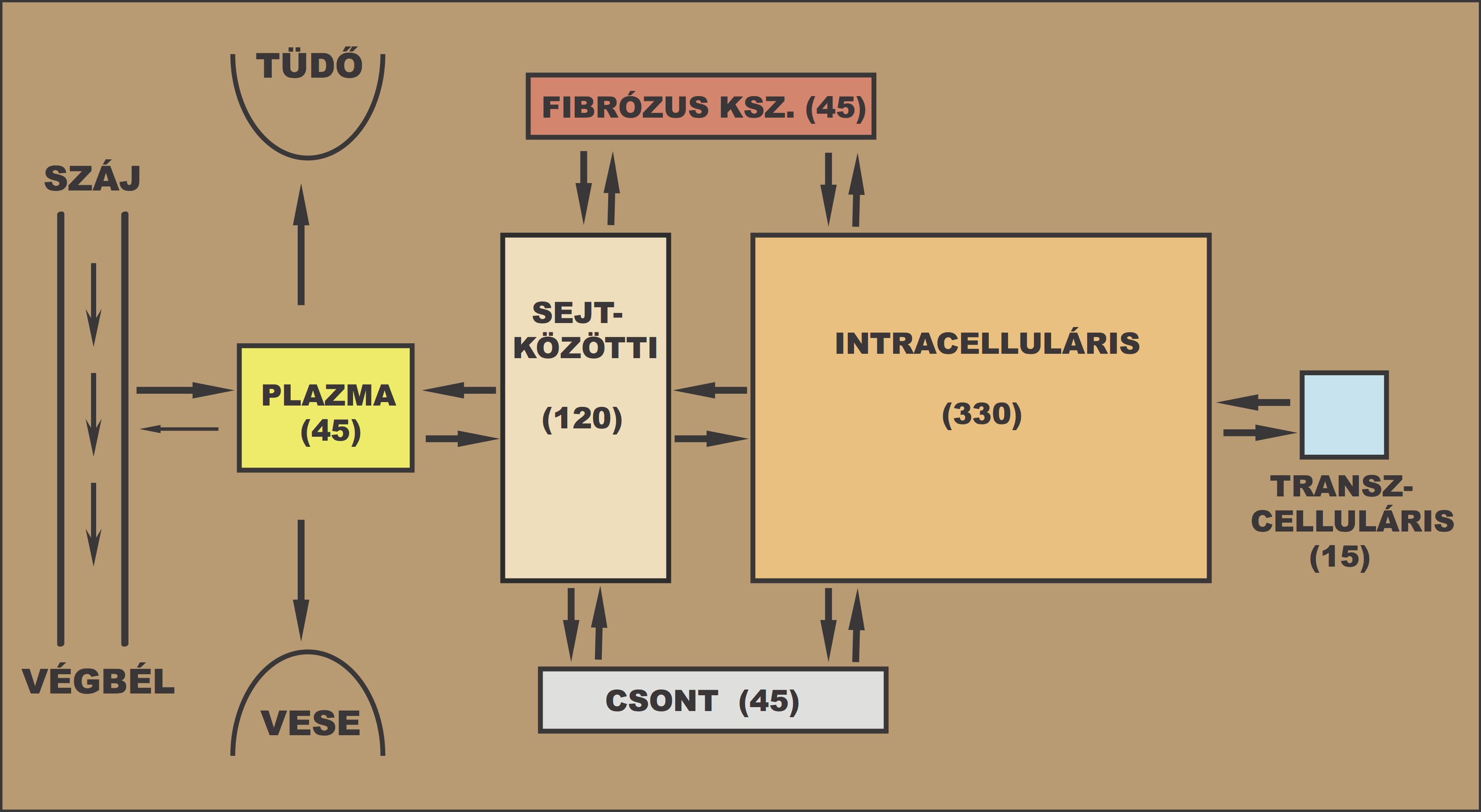 Folyadékterek színes vázlatos ábrázolása.